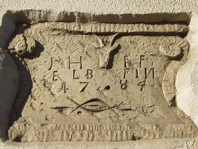 Historischer Ofenstein mit Datierung aus dem 18. Jhd. vermauert in Finkenbergstr. 5 in Heilbronn-Biberach